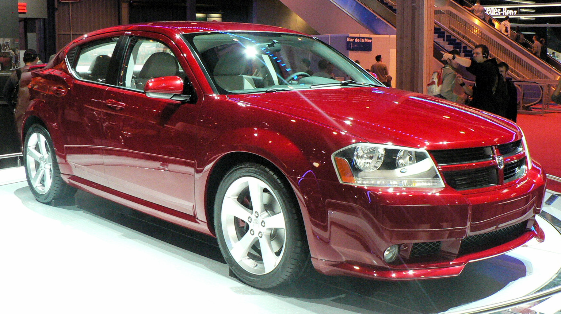 Mondial de l'automobile, Paris 2006